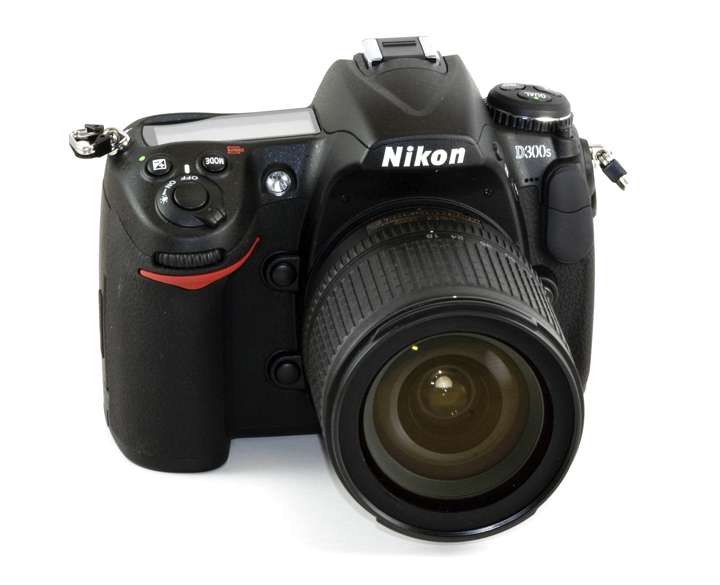 A Nikon D300s with Zoom-Nikkor 18-135mm lens.